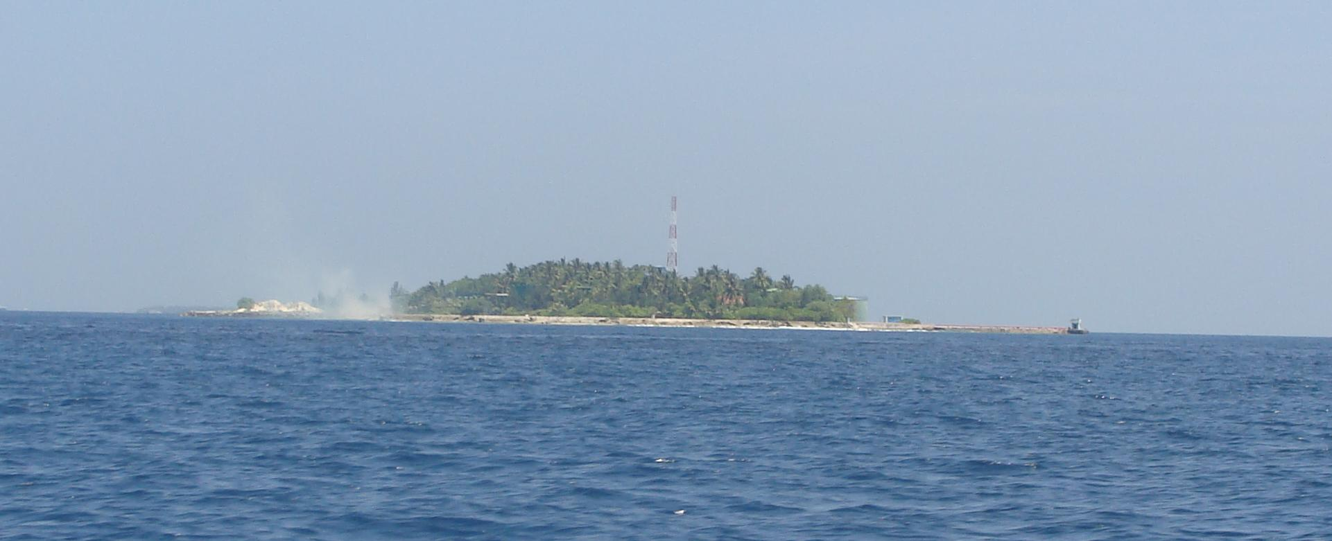 Dhoonidhoo Island